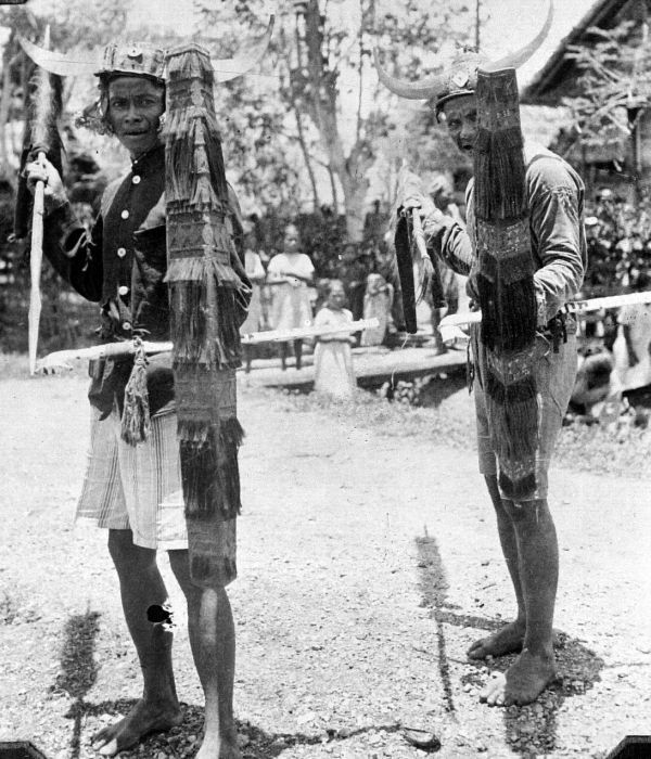 Repronegatief. 'Tjakalélé' dansers voeren een dans op in kampong Bora te Biromaru, Donggala, Celebes